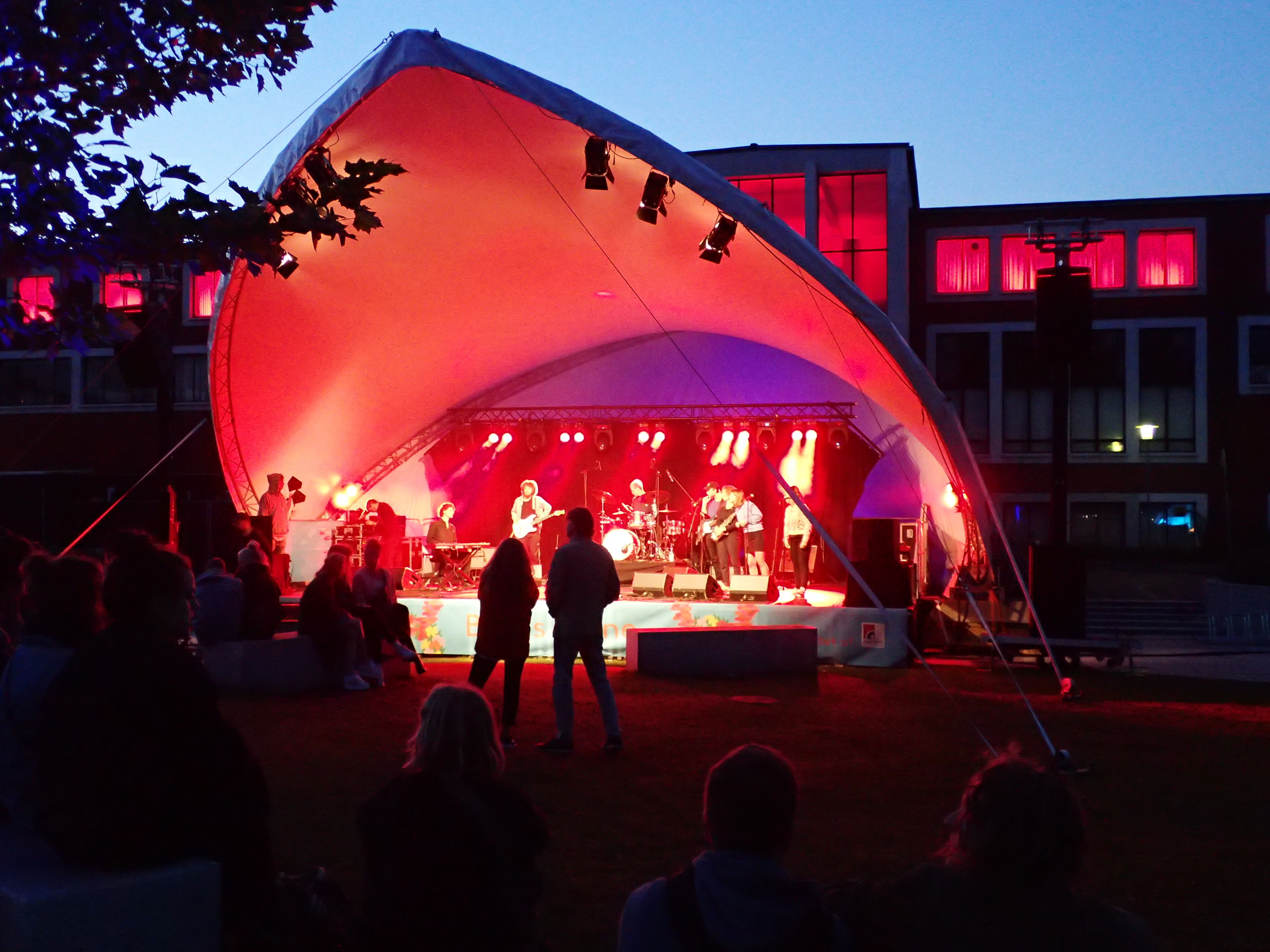 Byens Scene i Mølleparken, Aarhus Festuge 2017.